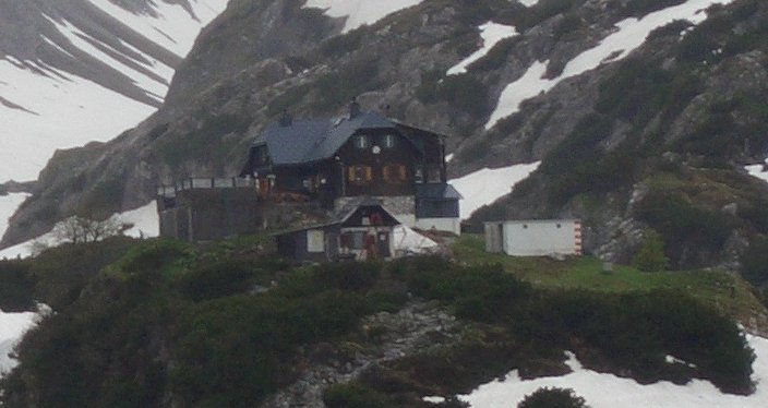 Voisthaler Hütte / Hochschwab / Austria